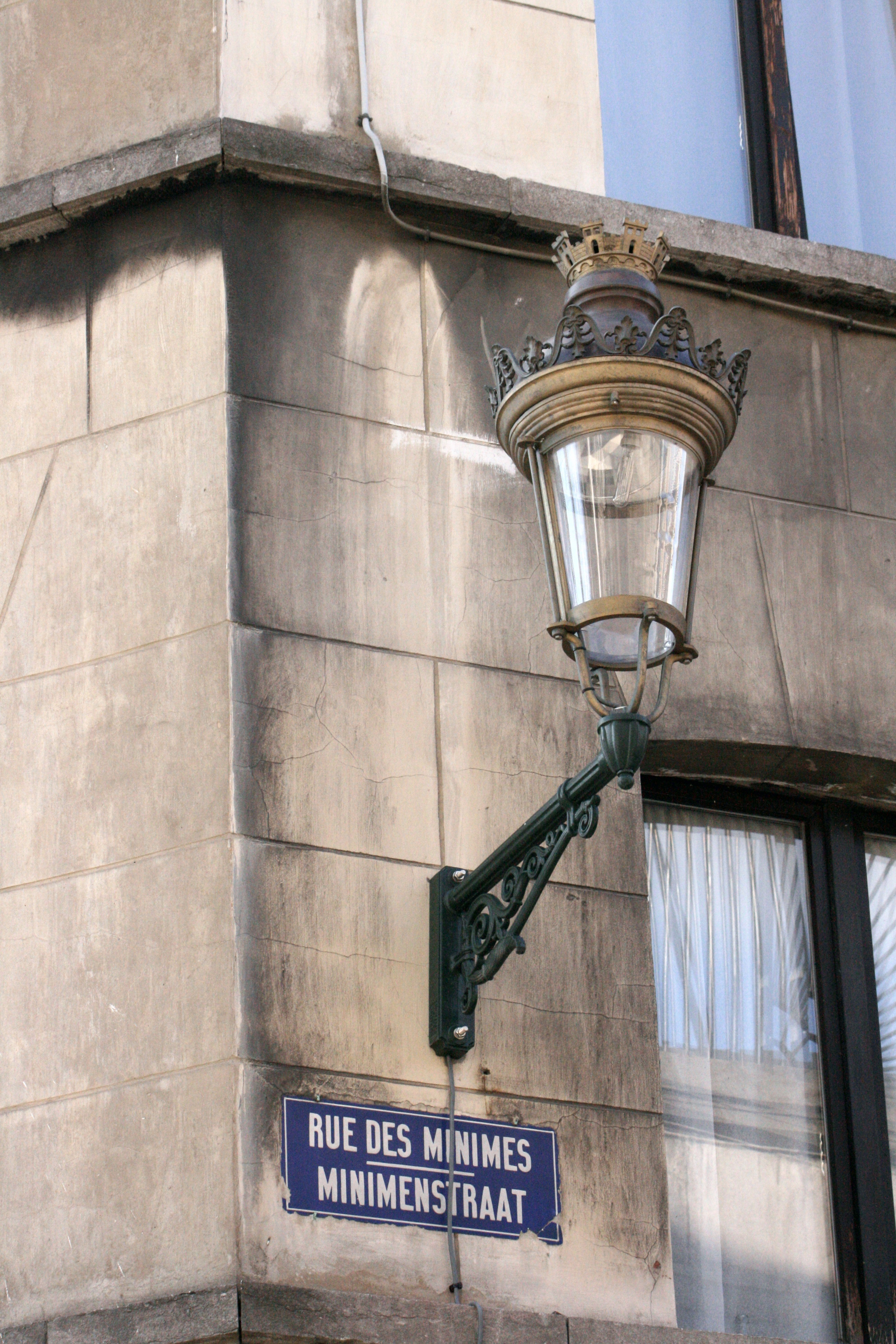 Rue des Minimes, Bruxelles, Belgique